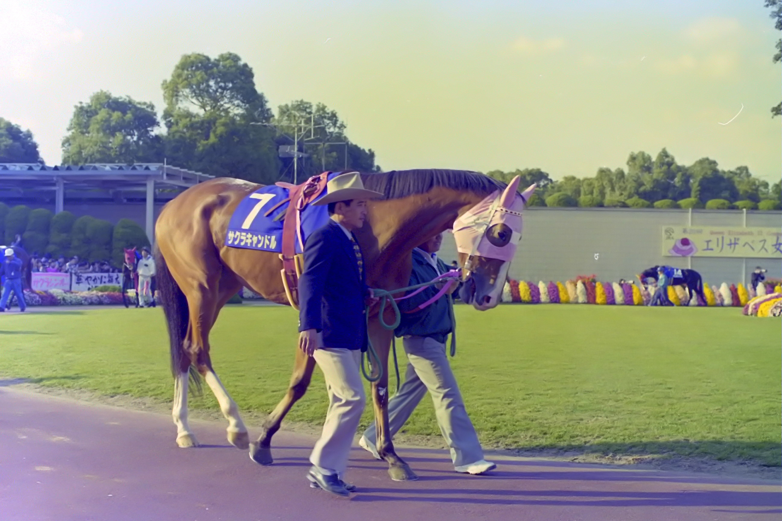 サクラキャンドル 1995年11月12日 京都競馬場